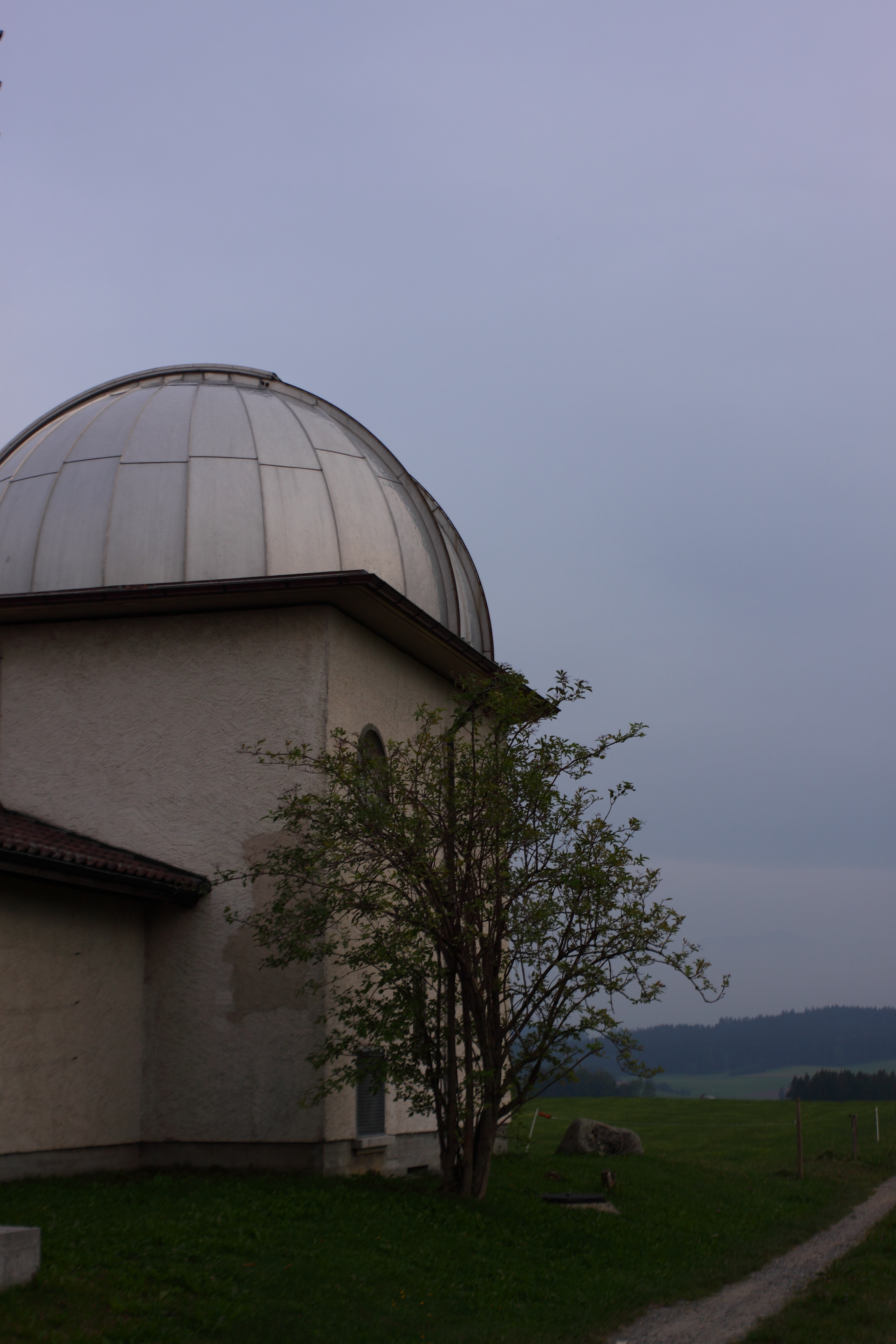 Sternwarte Zimmerwald